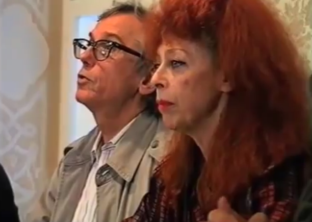 Das Künstlerehepaar Christo & Jeanne-Claude auf einer Pressekonferenz in Bonndorf (D) anlässlich einer Werk-Ausstellung. Szene Pressekonferenz.